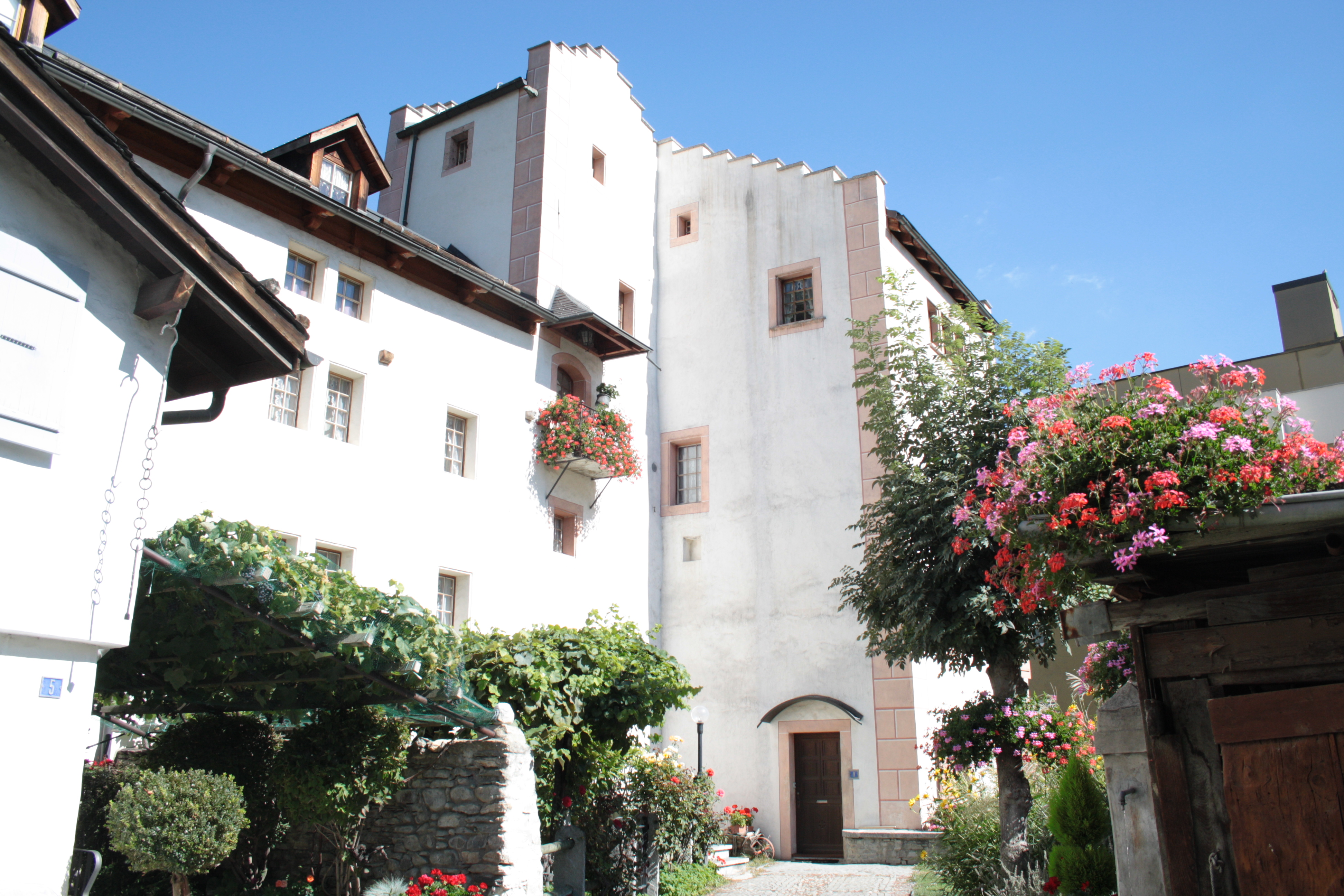 Pflanzetta. Ehemalige Suste in Visp. Erbaut 1352. In den 1980er renoviert.